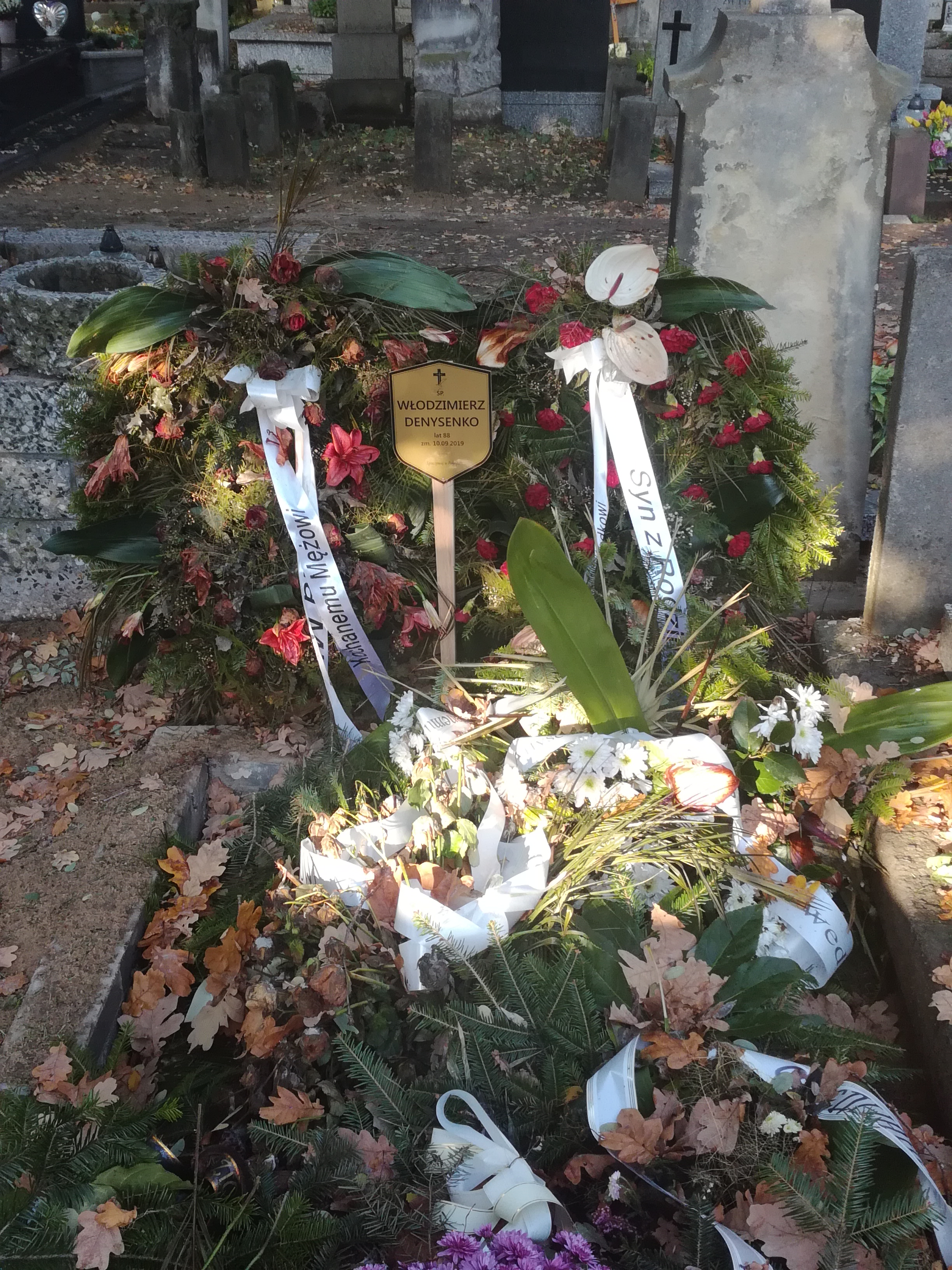 grób Włodzimierza Denysenki na Cmentarzu Bródnowskim (stan na 11 X 2019)